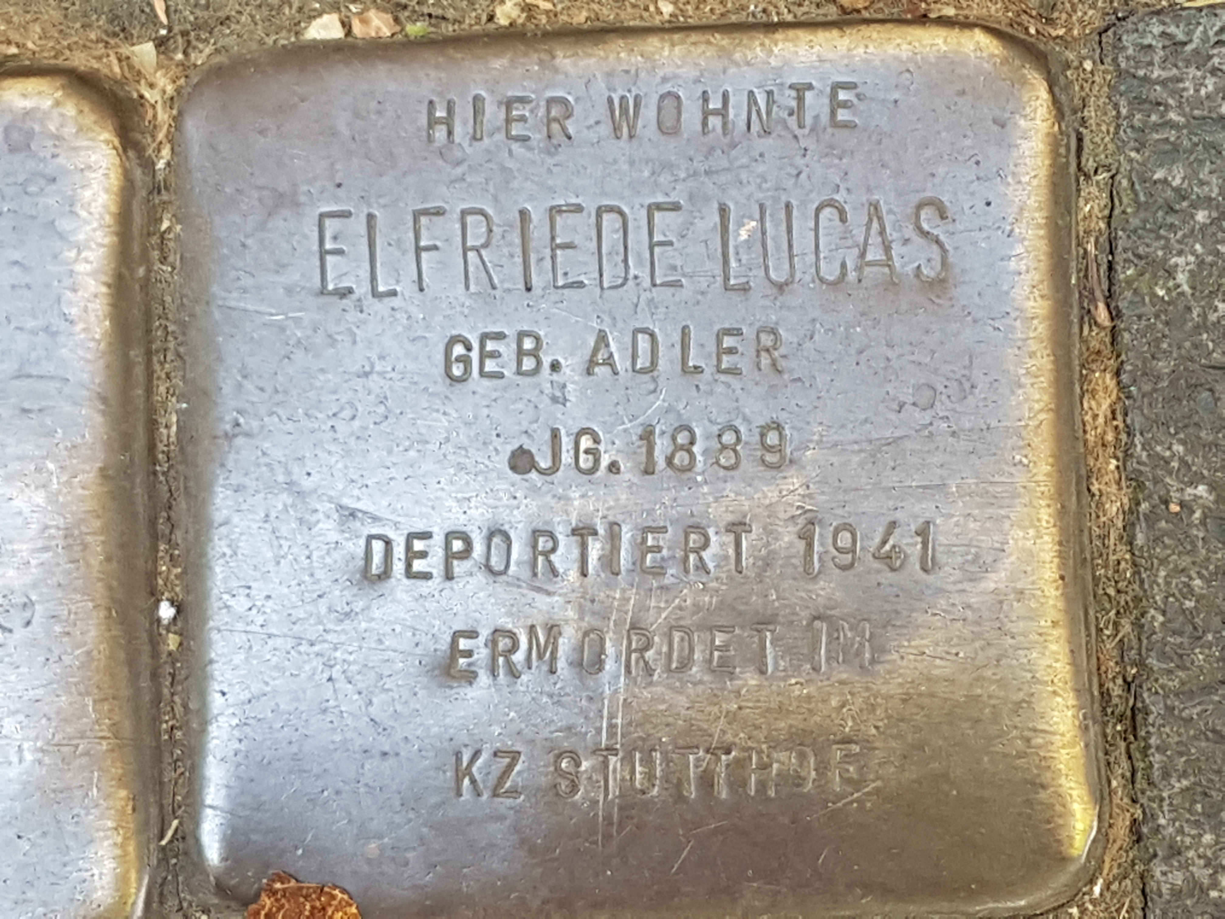 Stolperstein Duisburg